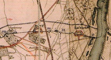 Karte des Gebiets nördlich der Stadt Magdeburg, zwischen Neue Neustadt und Rothensee, eingezeichnet der nördliche Teil des Fortrings um die Festung Magdeburg, rechts Zwischenwerk VIII a und die Elbe, links davon Fort VIII und der (heute noch bestehende Vogelgesangpark), Ausschnitt aus größerer Karte der Gesamtfestung